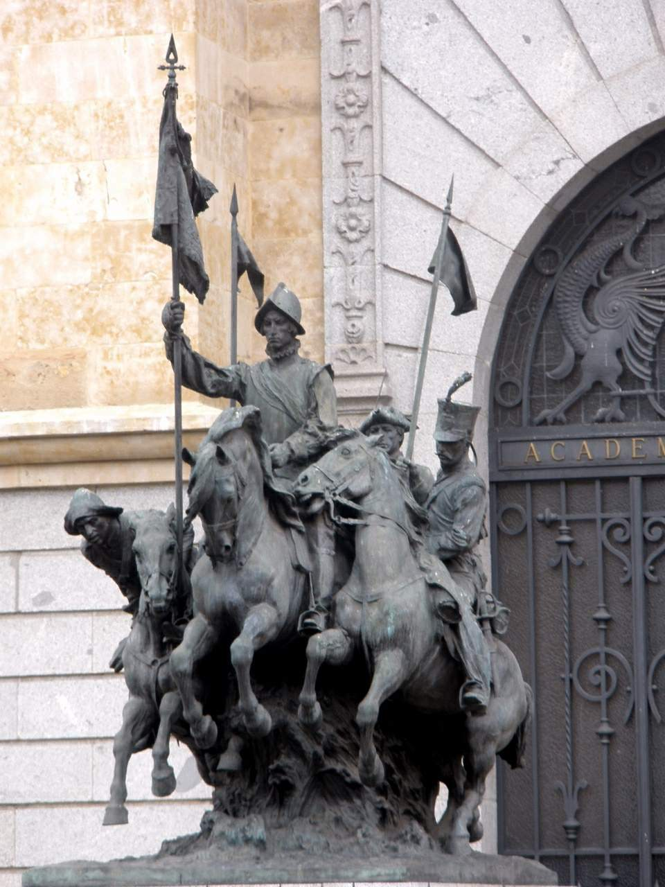 Academia de Caballeria (Valladolid)